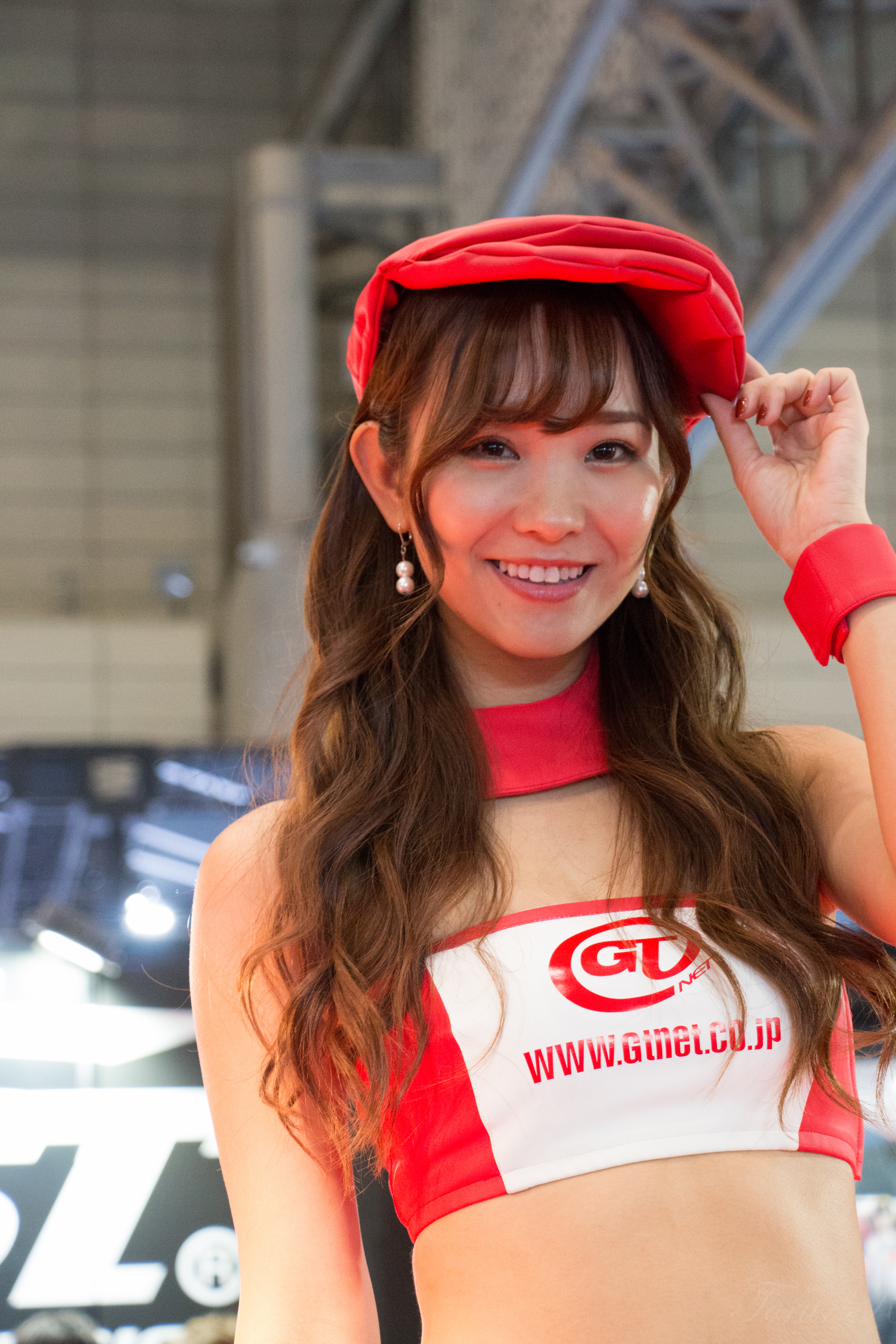 2019東京オートサロン GTNETブース 西村いちか